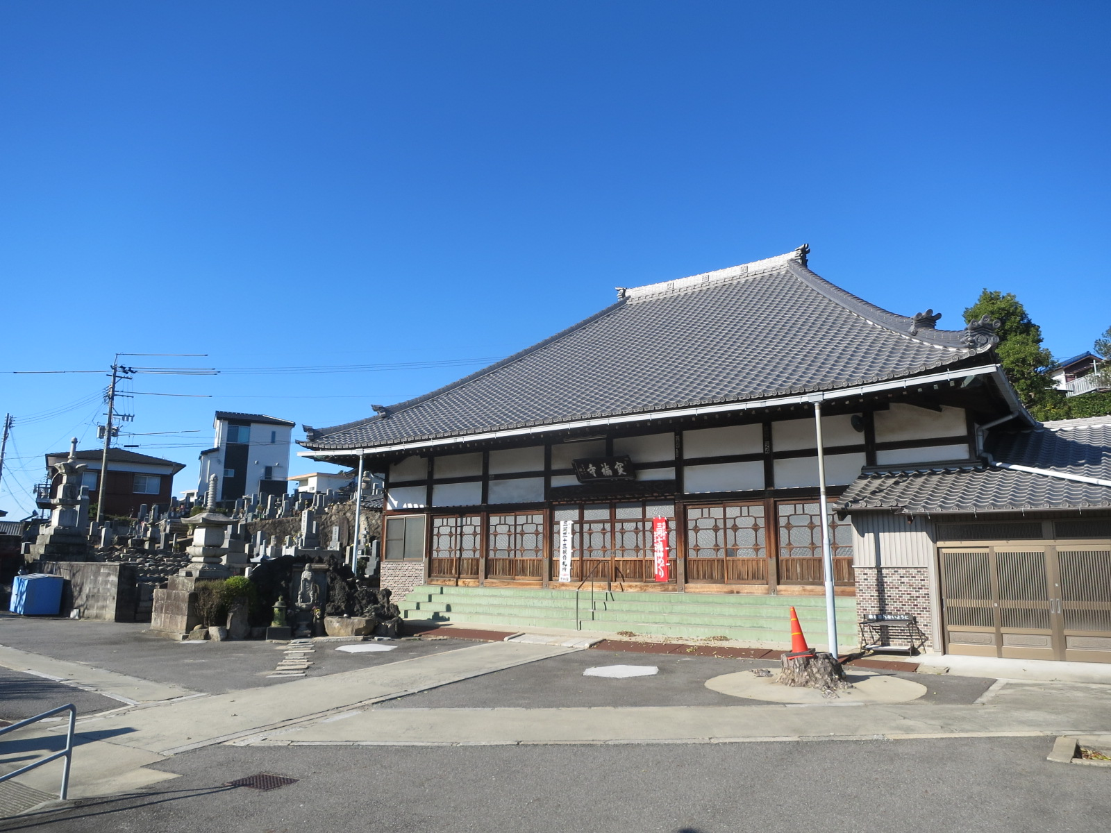 岡崎市 宝福寺